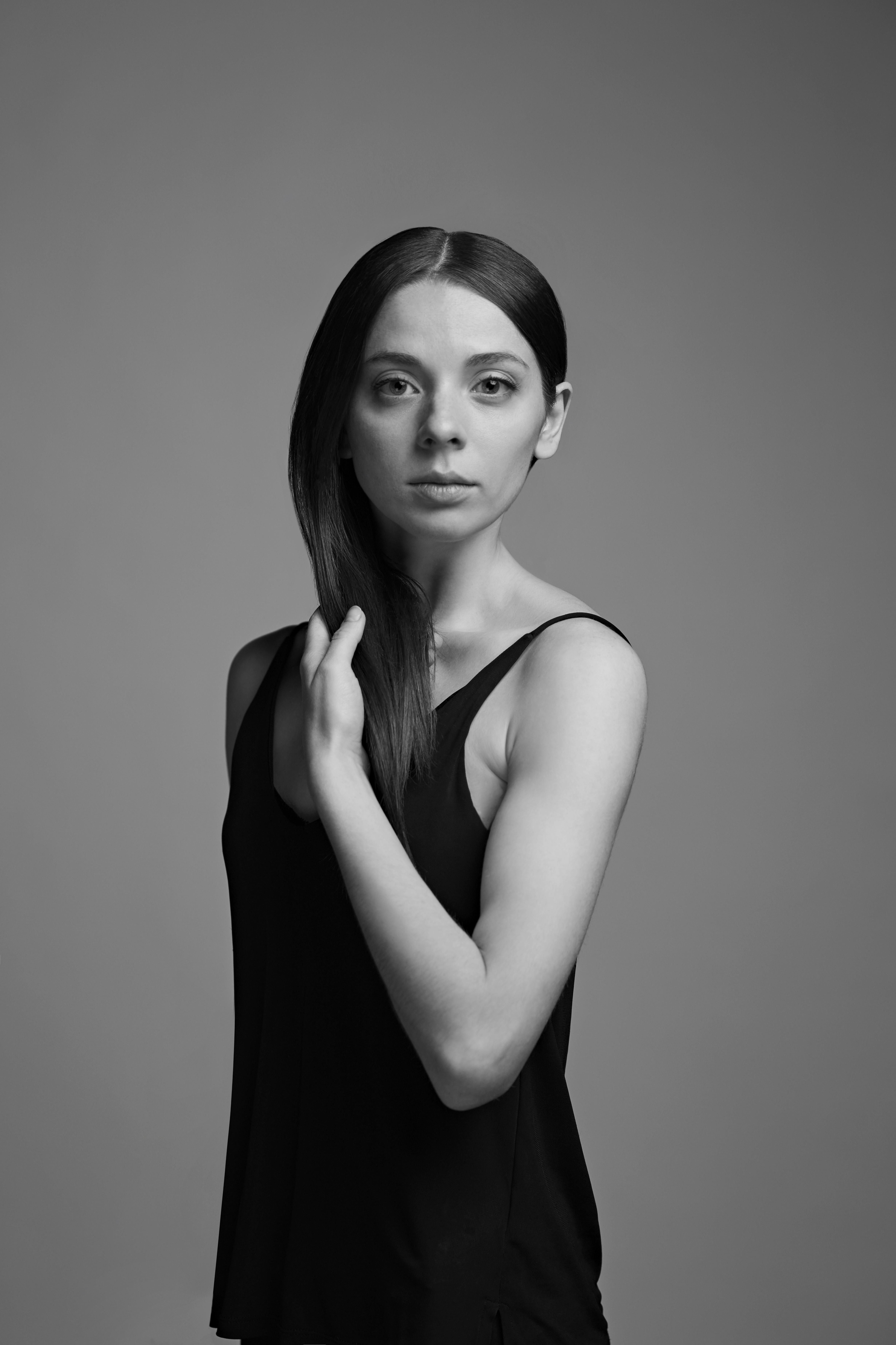 Alina Nanu, první sólistka Baletu Národního divadla v Praze